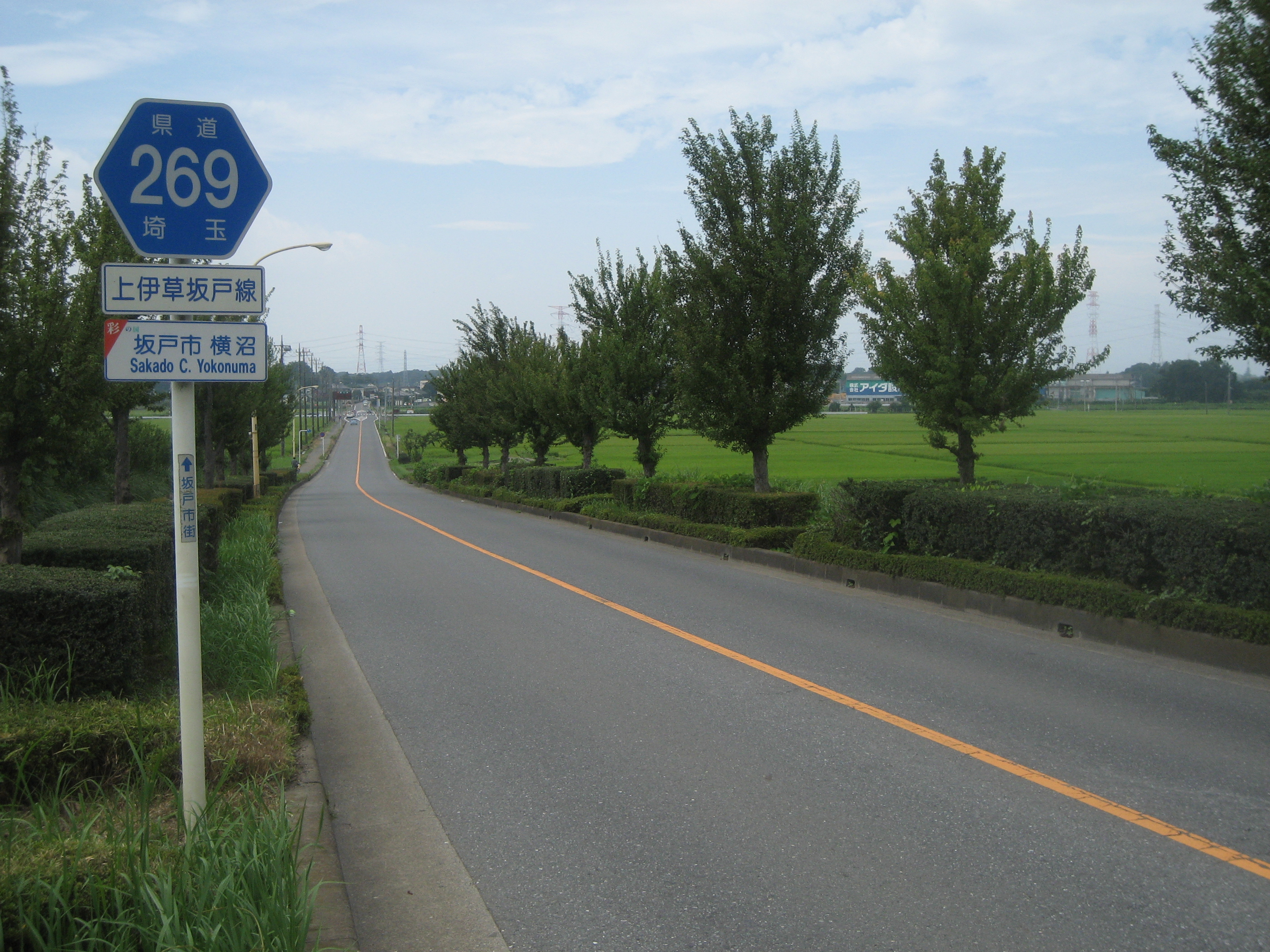 埼玉県道269号線坂戸市横沼付近（坂戸市街方面を撮影）